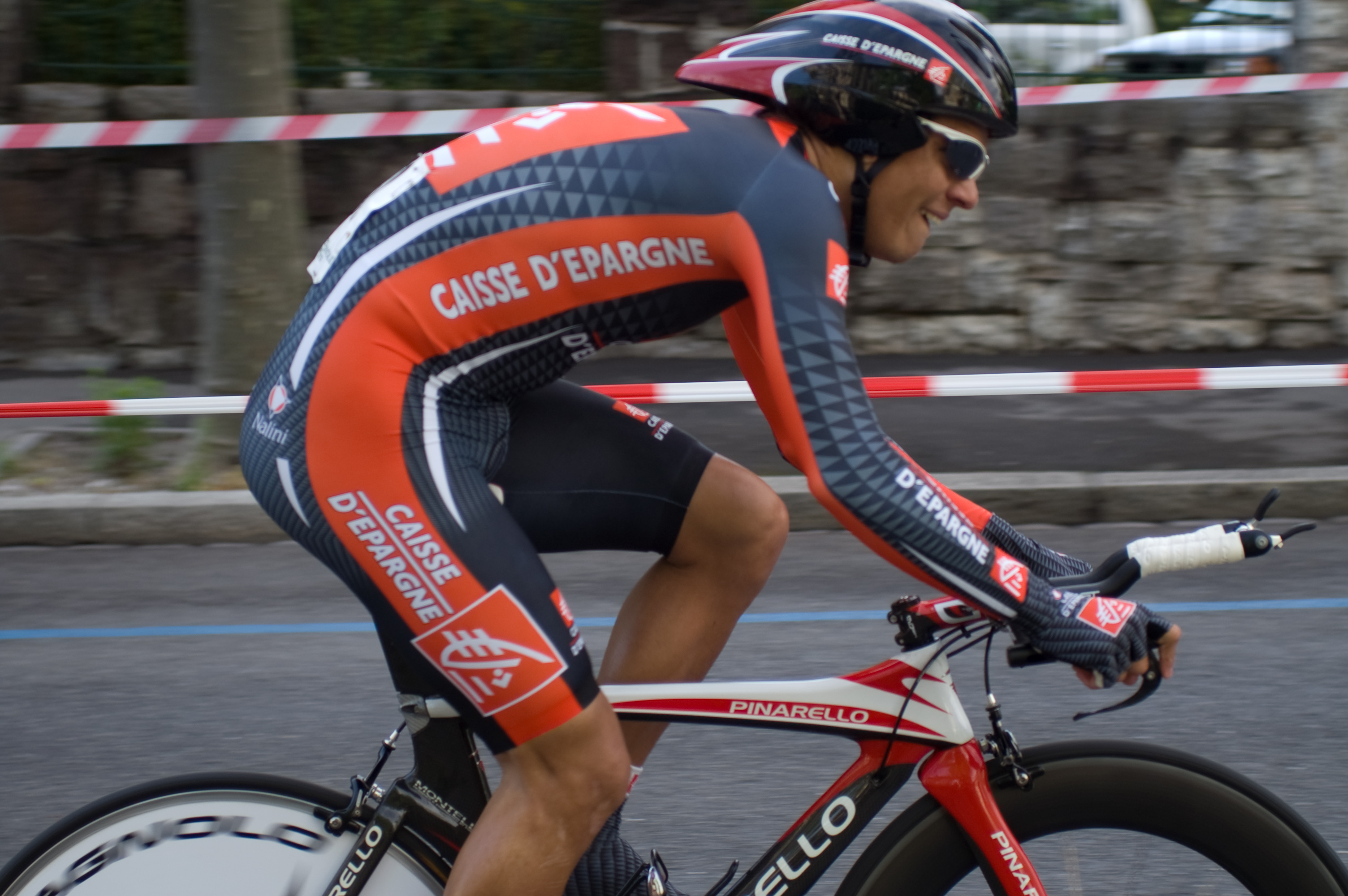 Andrey Amador Bikkazakova au Tour de Romandie 2009 - prologue